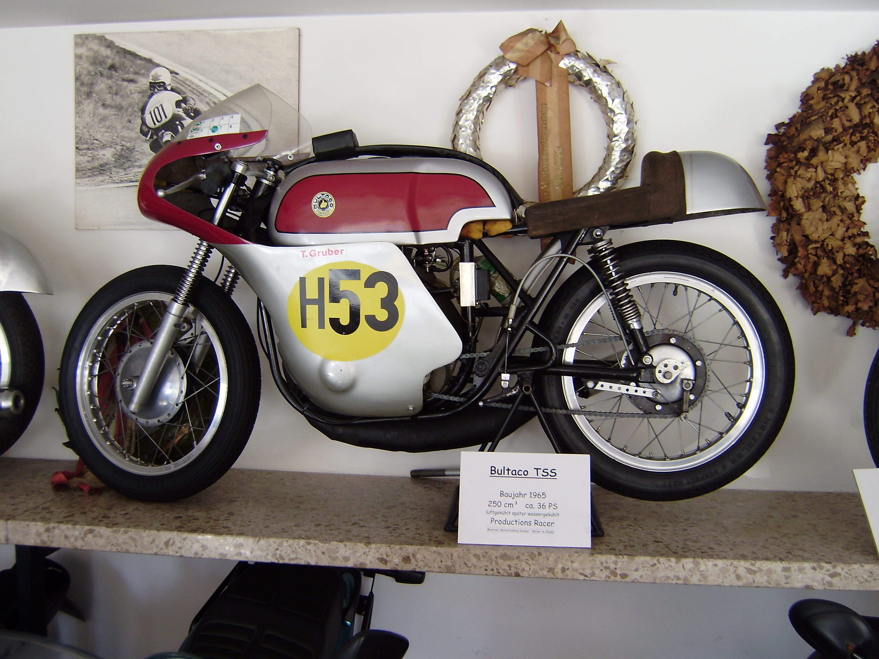 Toni Grubers Rennmotorrad Bultaco TSS, 250 ccm, 36 PS, aus dem Jahr 1965, ausgestellt im Rennsportmuseum des Autohauses Gruber in Weiler im Allgäu